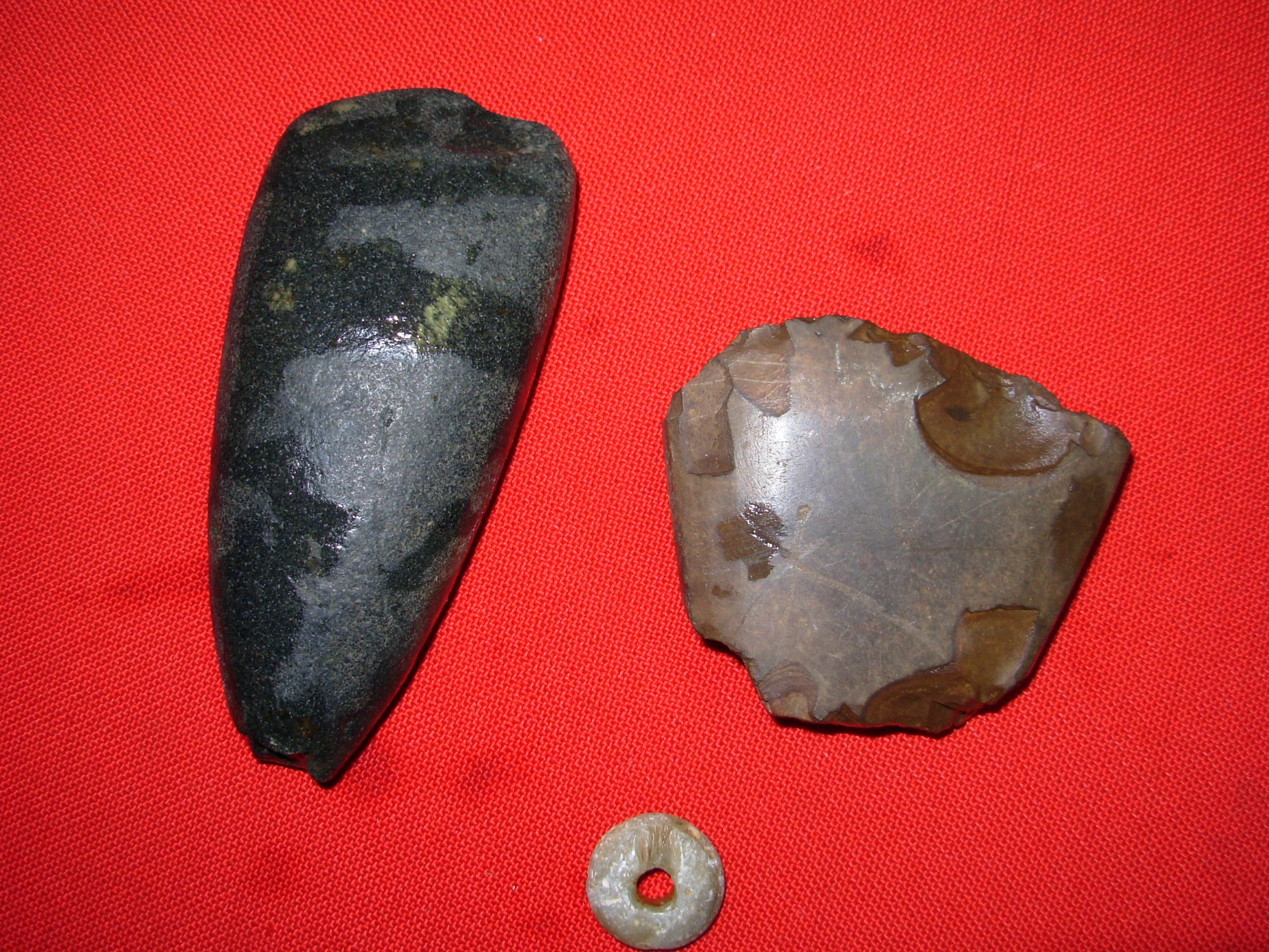 Ascia neolitica dalla collezione archeologica Capitanio